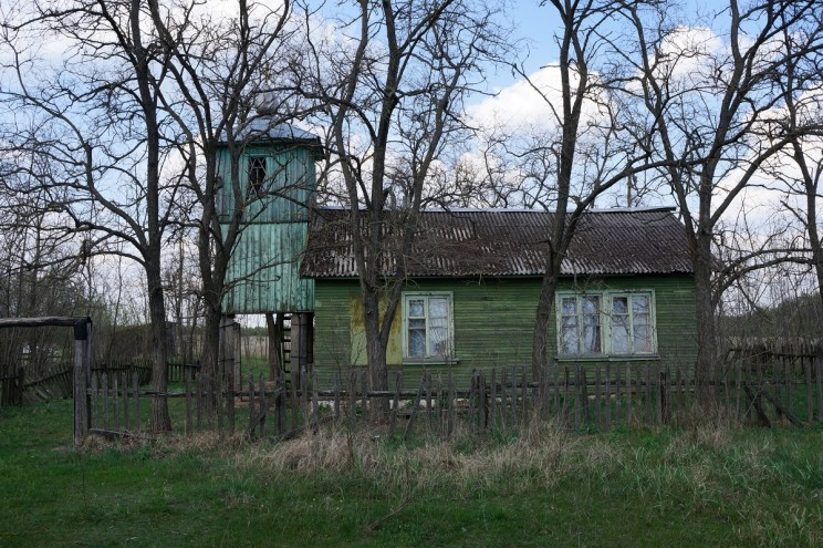 д.Углы Бобруйского района молитвенный дом